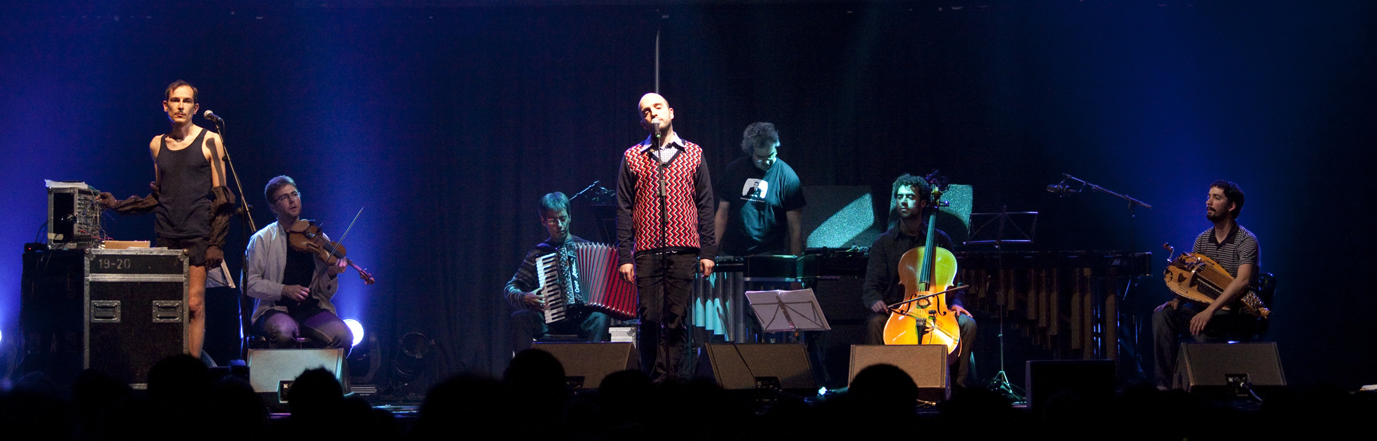 Astrud - Escena BCN 2010